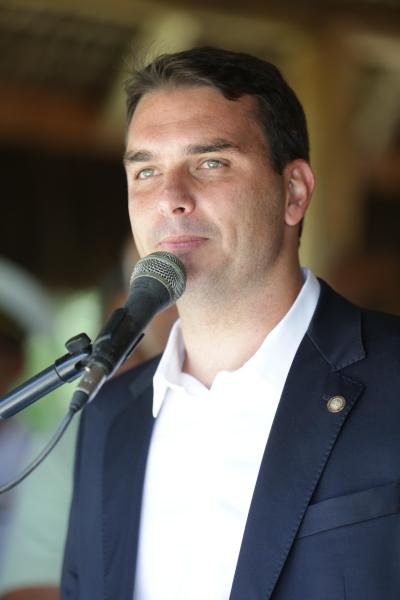 SEAP REALIZA FORMATURA DO GRUPAMENTO DE INTERVENÇÃO TÁTICA O Deputado Estadual Flavio Bolsonaro frisou a qualidade dos formandos. “É com muito orgulho que participo desta cerimônia. Tenho ciência da dificuldade do curso, mas tenham certeza que não há qualificação igual neste país”, afirmou.